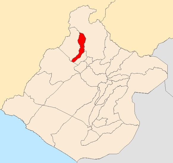 Mapa distrito Cairani,Tacna - Perú